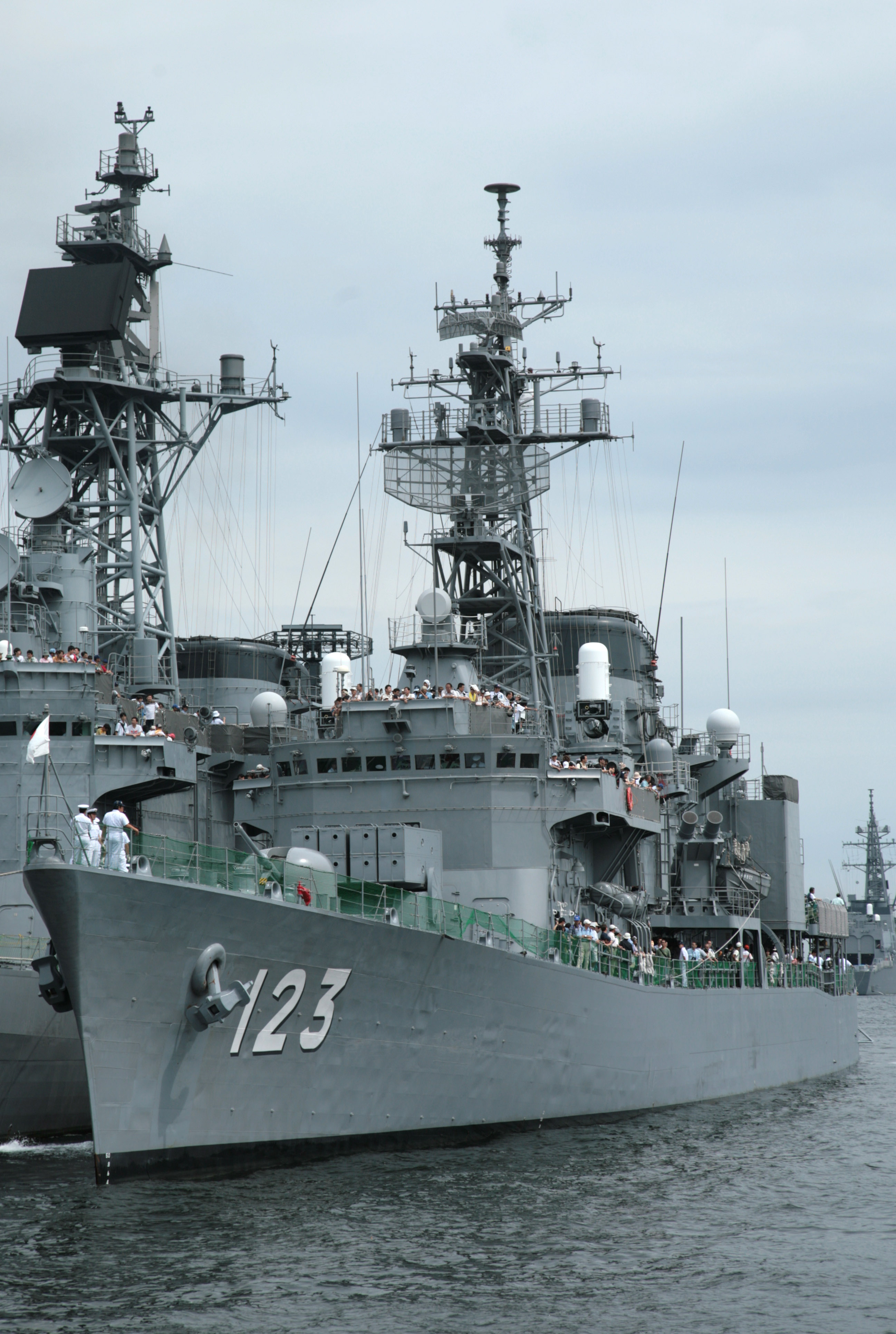 JS Shirayuki (DD-123) docked in Yokosuka at a JMSDF open day.